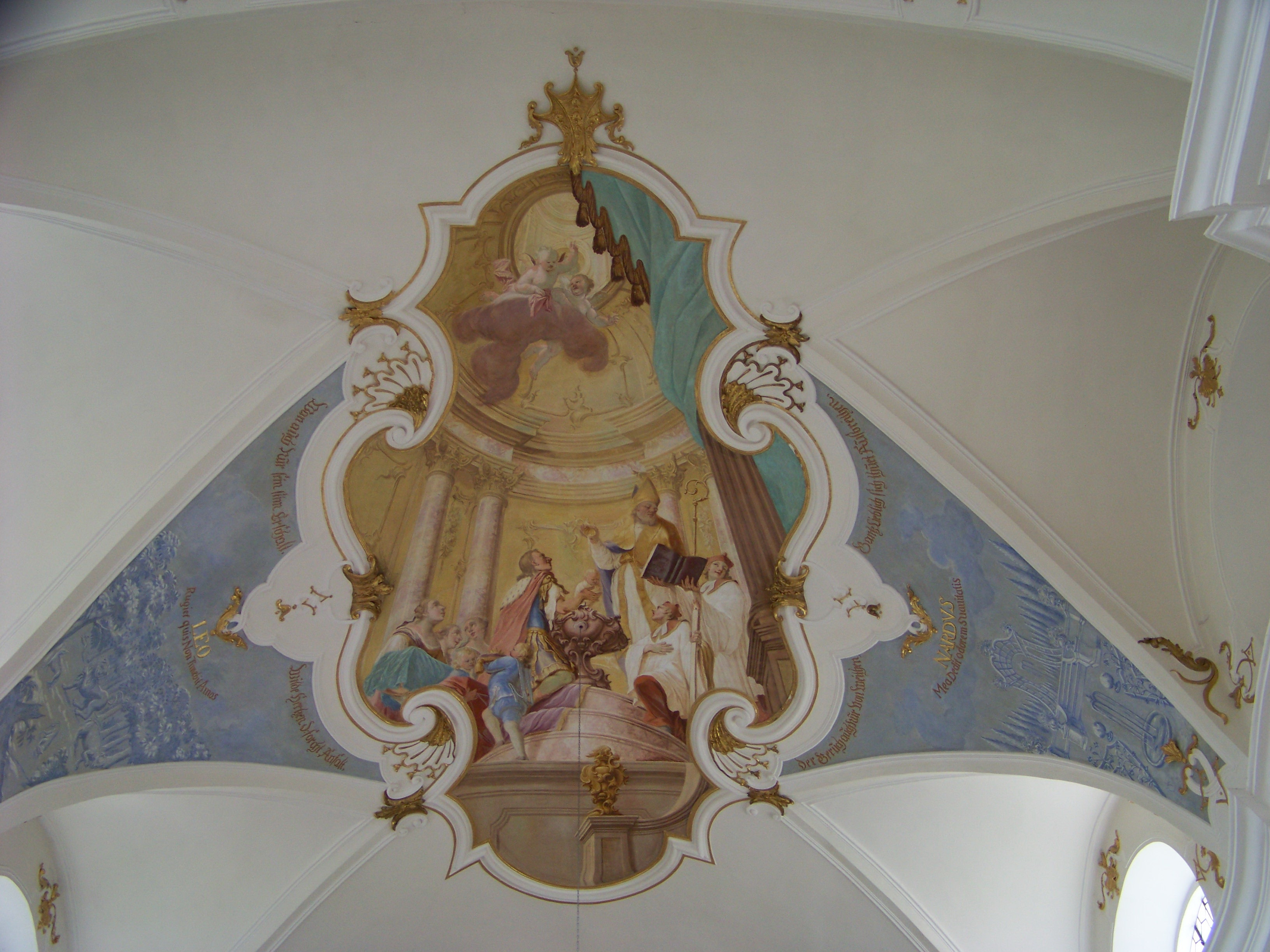 Rottenburg an der Laaber. Oberotterbach, Leonhardistraße 12. Wallfahrtskirche St. Leonhard. Das Fresko im Chorgewölbe zeigt die Taufe des heiligen Leonhard.